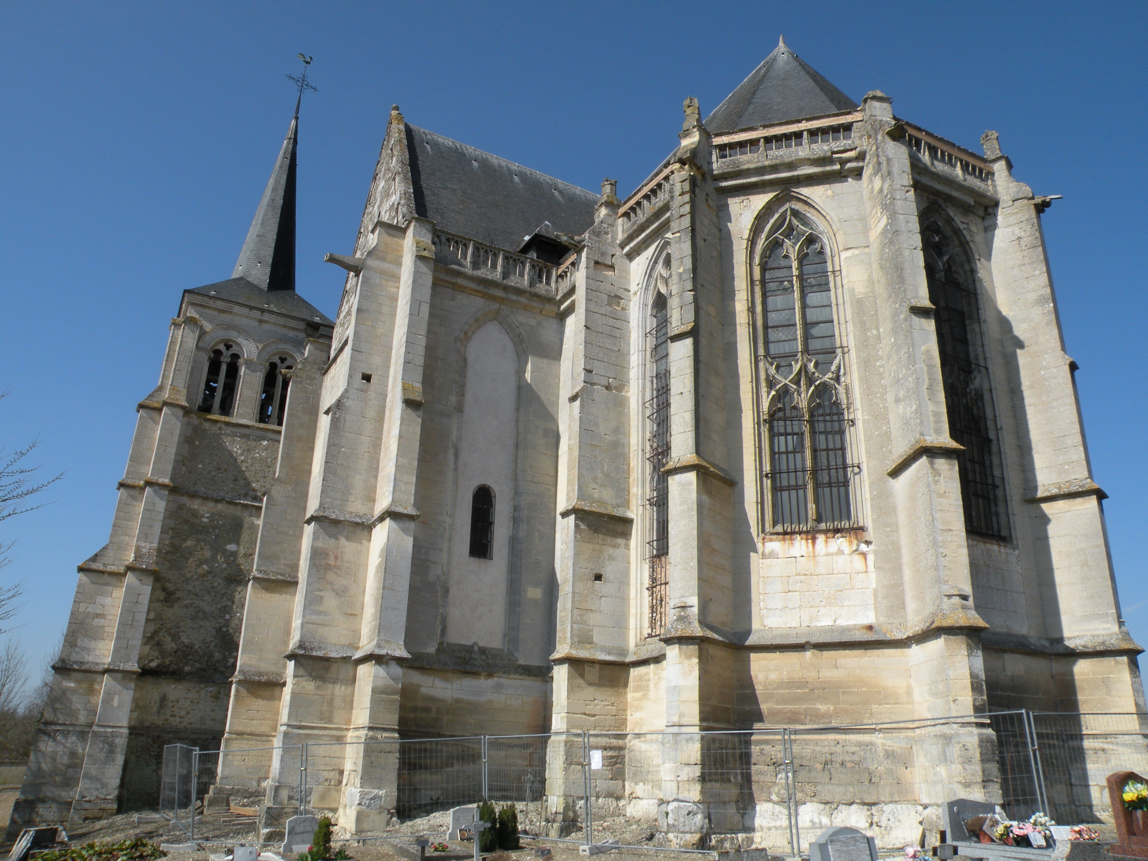 église de Therdonne